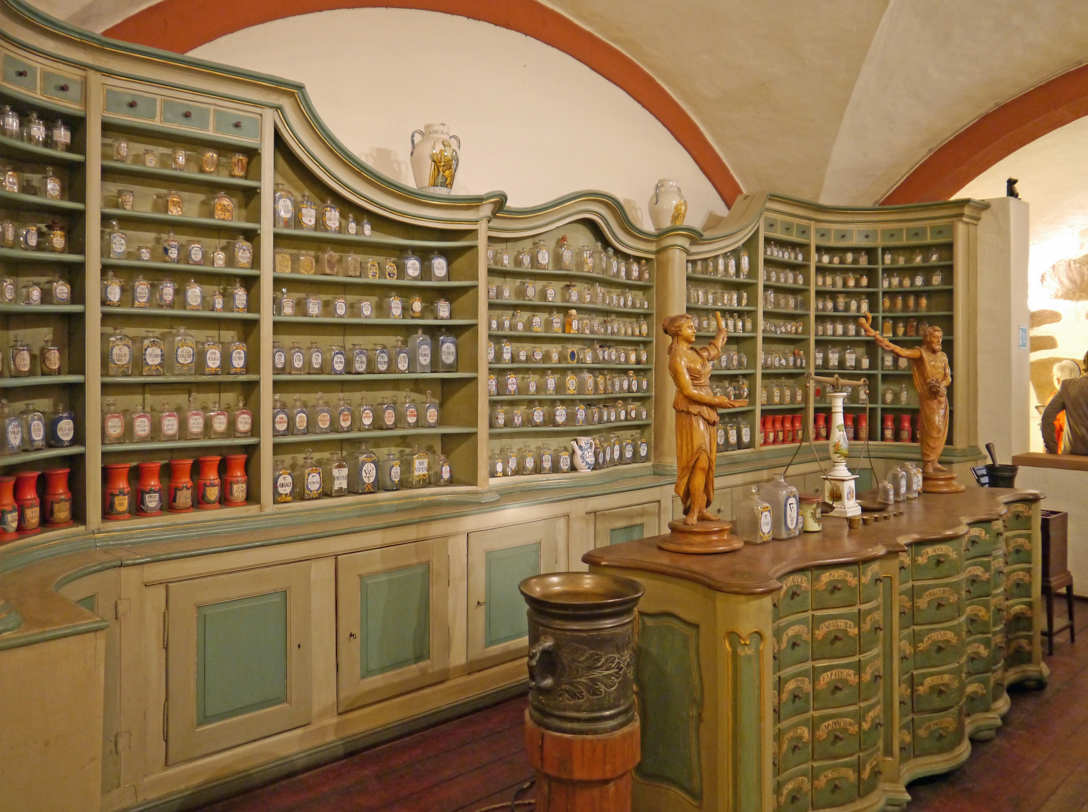 Das Deutsche Apothekenmuseum (2012) im Heidelberger Schloss.